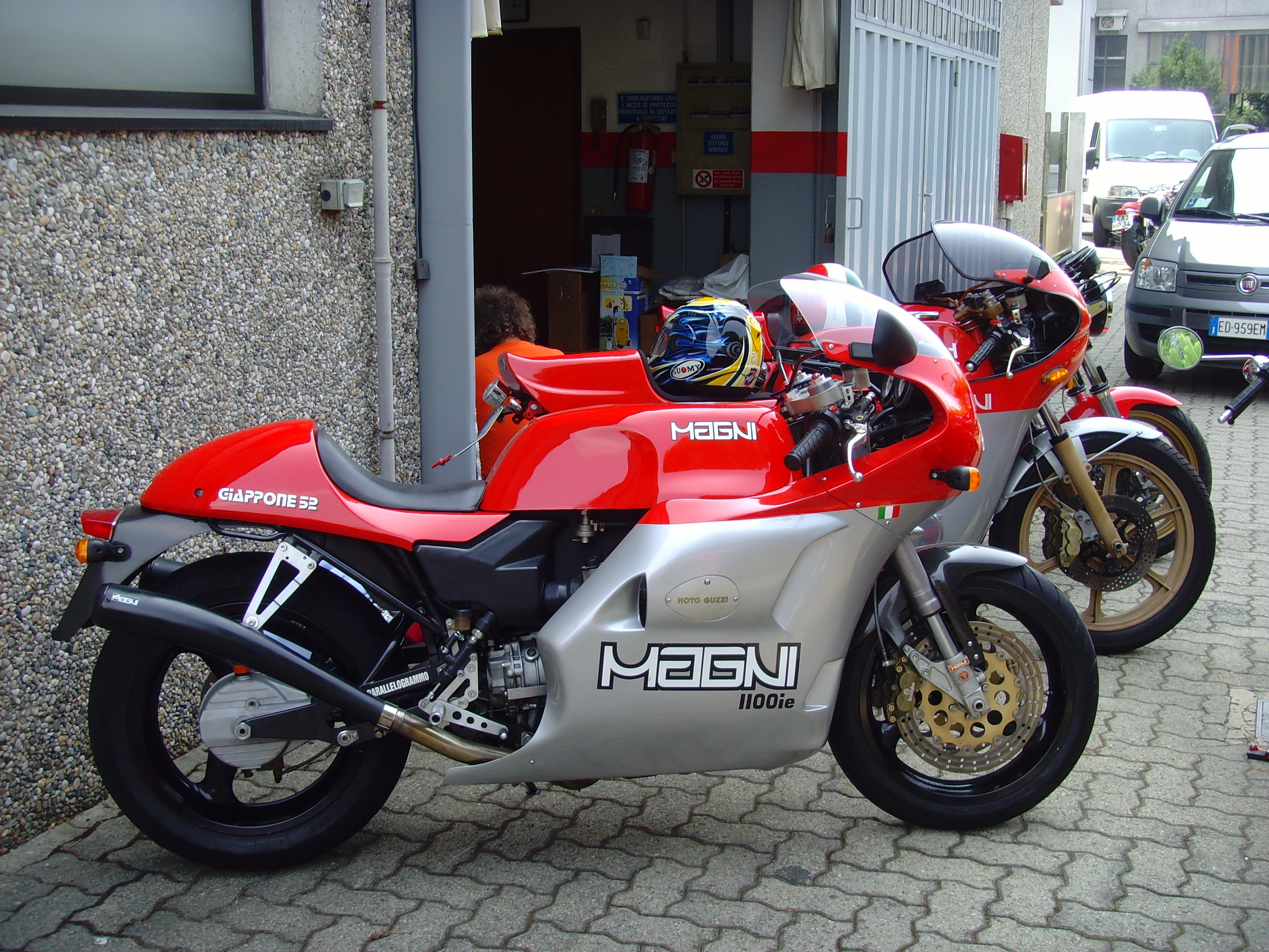 Magni Giappone '52 1100 i.e. con propulsore Moto Guzzi